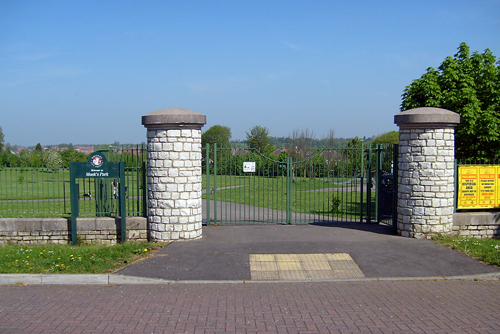 Monks Park in Bristol. UK